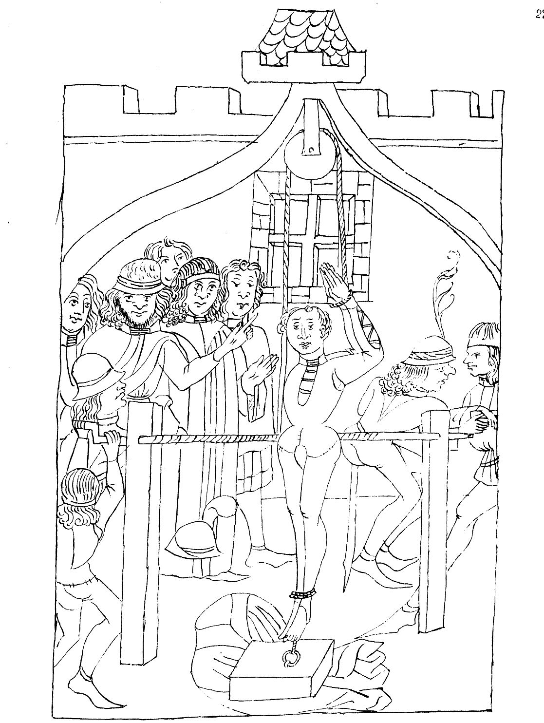 Peter von Hagenbach wird gefoltert (Wiedergabe bei Mone, Quellensammlung Bd. 3, Tafelanhang nach der verbrannten Straßburger Handschrift fol. 205a, zum Text ed. Mone S. 374)